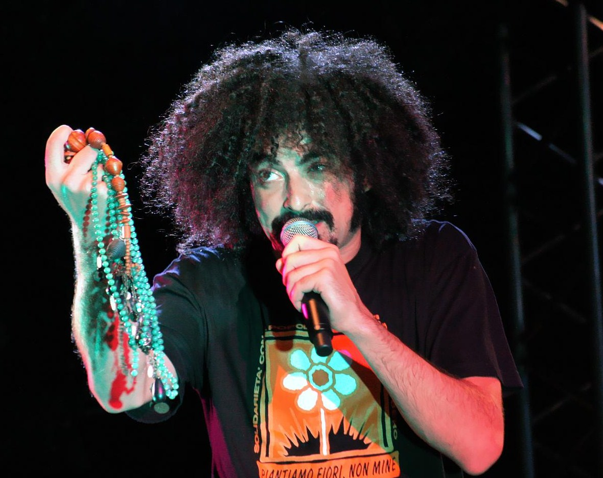 Caparezza al BassFestival di S.Agata Bolognese il 13 luglio 2008.